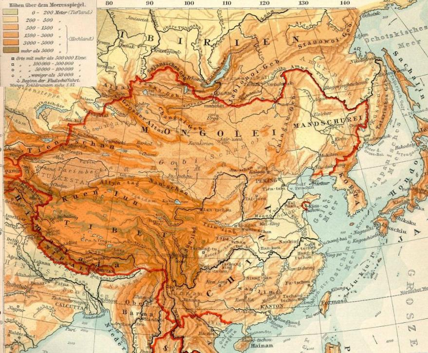 Topografie der Mongolei